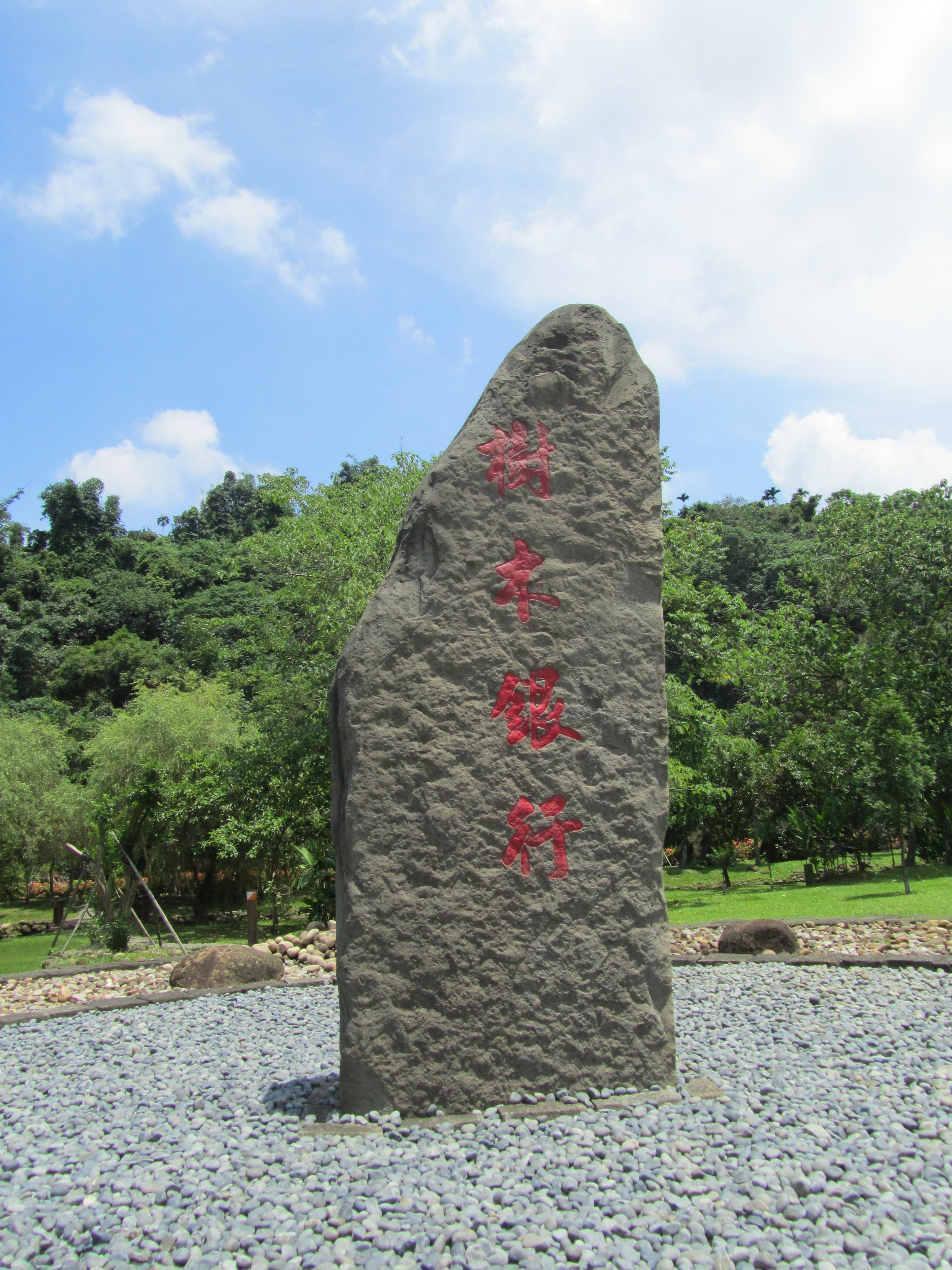 嘉義觸口自然教育中心-入口意象